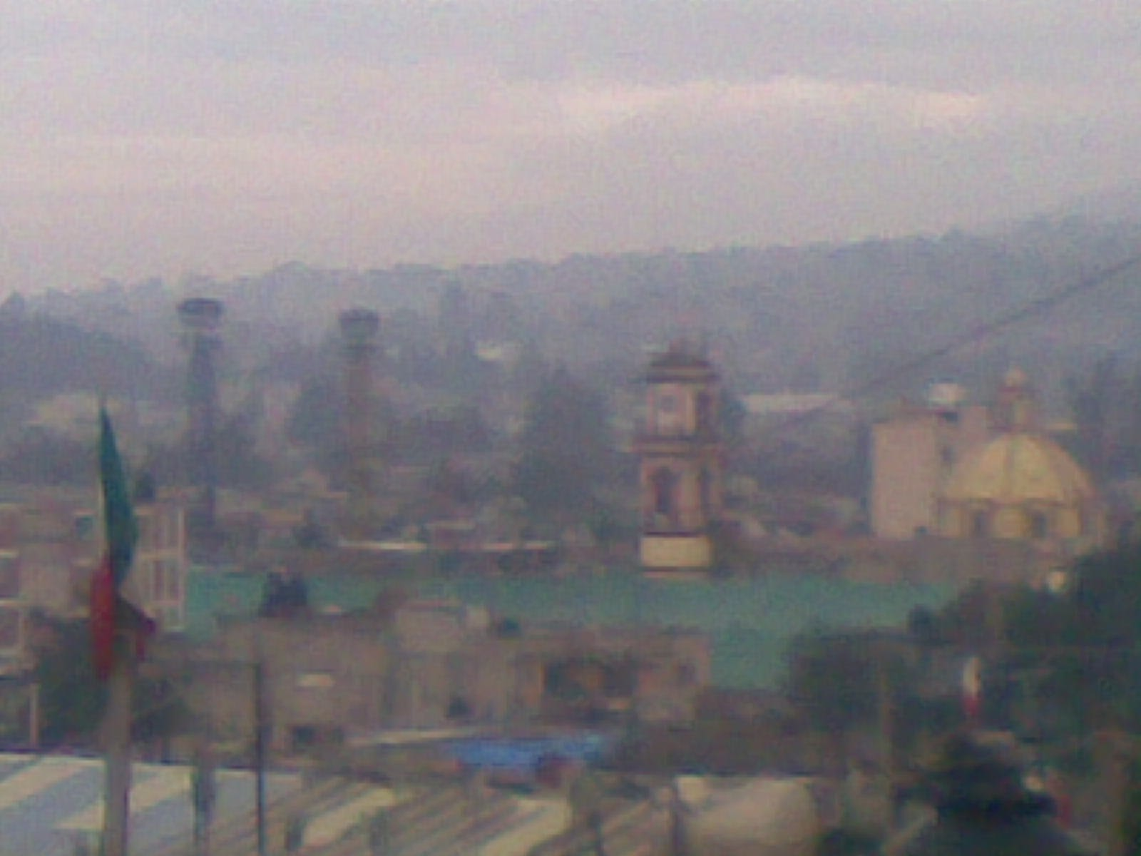 Vista lejana de San Miguel Ameyalco.